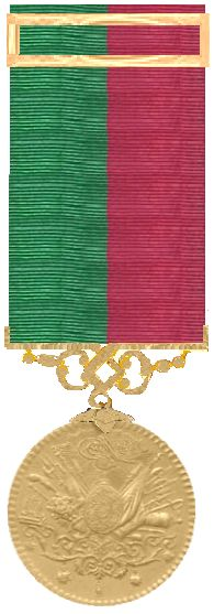 Turkse medaille 1882 - 1918